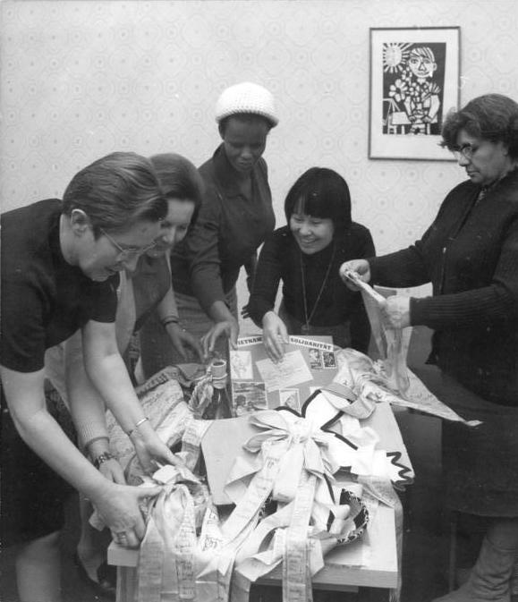 Zentralbild Mittelstädt 22.1.71 Berlin: Frauen des Oderbezirkes üben Solidarität mit Vietnam. Mit Geldbeträgen verbundene Unterschriften auf Schleifenbändern bekunden erneut die Solidarität der Frauen des Bezirkes Frankfurt-Oder mit dem kämpfenden vietnamesischen Volk. Aus Anlaß des 25. Jahrstages der IDFF rief der DFD-Bezirksvorstand die Frauen des Oderbezirkes zu dieser Solidaritätsaktion auf. I, Sekretariat der IDFF, in Berlin, nahmen die Generalsekretärin des IDFF, Cecilie Hugel - Frankreich -(2.v.l.), und die Mitglieder des Sekretariats der IDFF: Helga Dickel (links) - BRD, Kate Molale (3.v.l.) - Südafrika -, Takako Tatematsu (2.v.r) - Japan sowie Emperatin Villarros (rechts) aus Chile, die Solidaritätsspende entgegen.